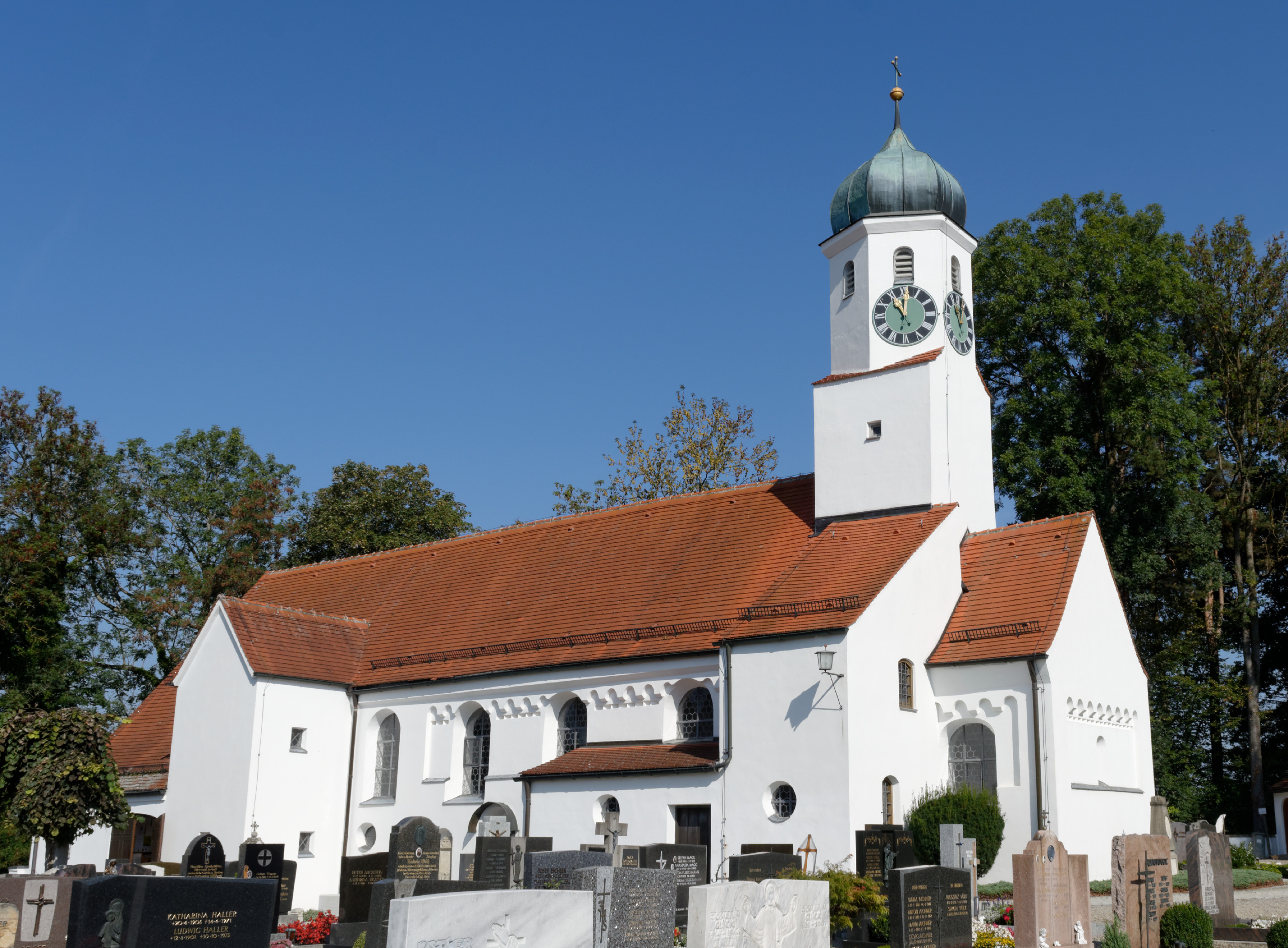 Denkmal-Nr. D-7-71-129-1This is a photograph of an architectural monument.